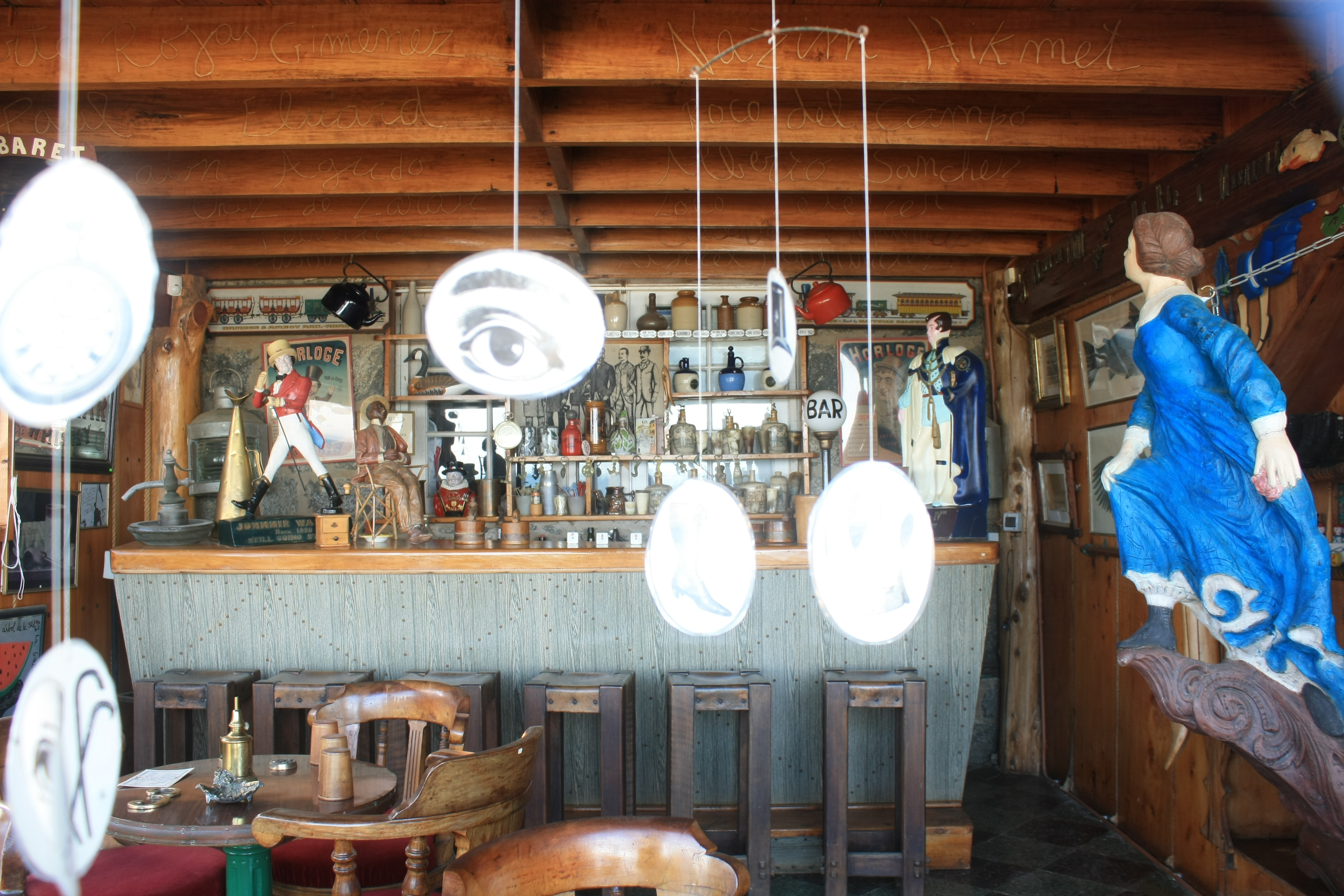 Sector costero de Isla Negra. Casa de Pablo Neruda, vista desde la playa de Isla Negra. This is a photo of a national monument in Chile: 792